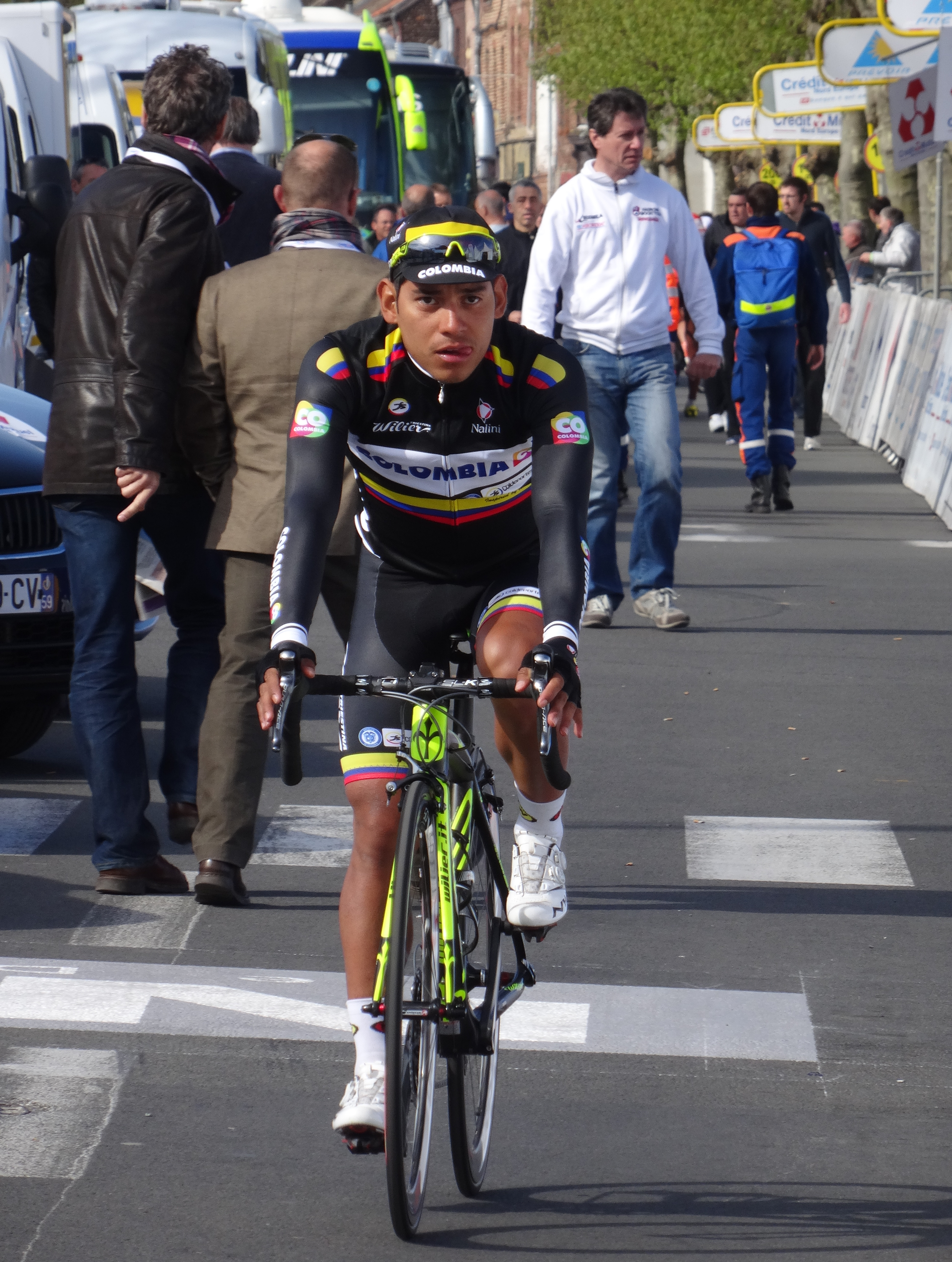 Reportage réalisé le jeudi 17 avril à l'occasion du départ et de l'arrivée du Grand Prix de Denain 2014 à Denain, Nord, Nord-Pas-de-Calais, France.